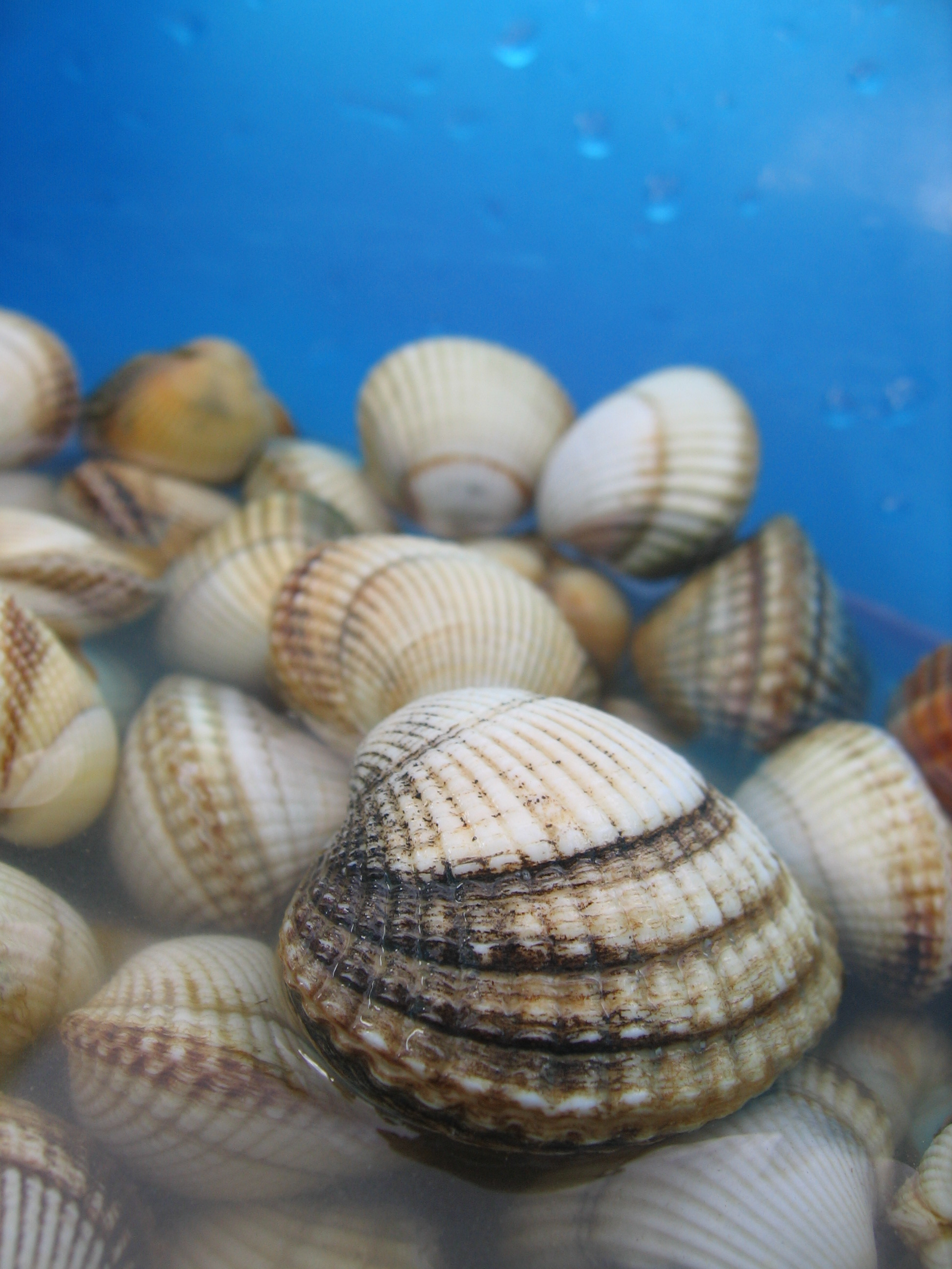 Cockles (Cerastoderma edule) from Lingreville - France